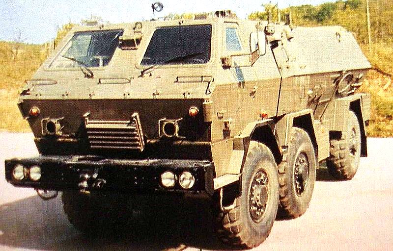 reprodukcia: pancierový automobil TATRAPAN vo výzbroji Armády Slovenskej republiky